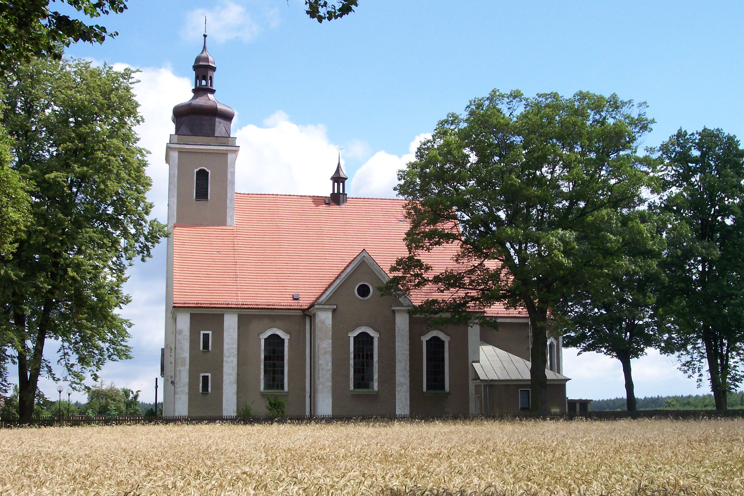 Kościół w Zborowskiem